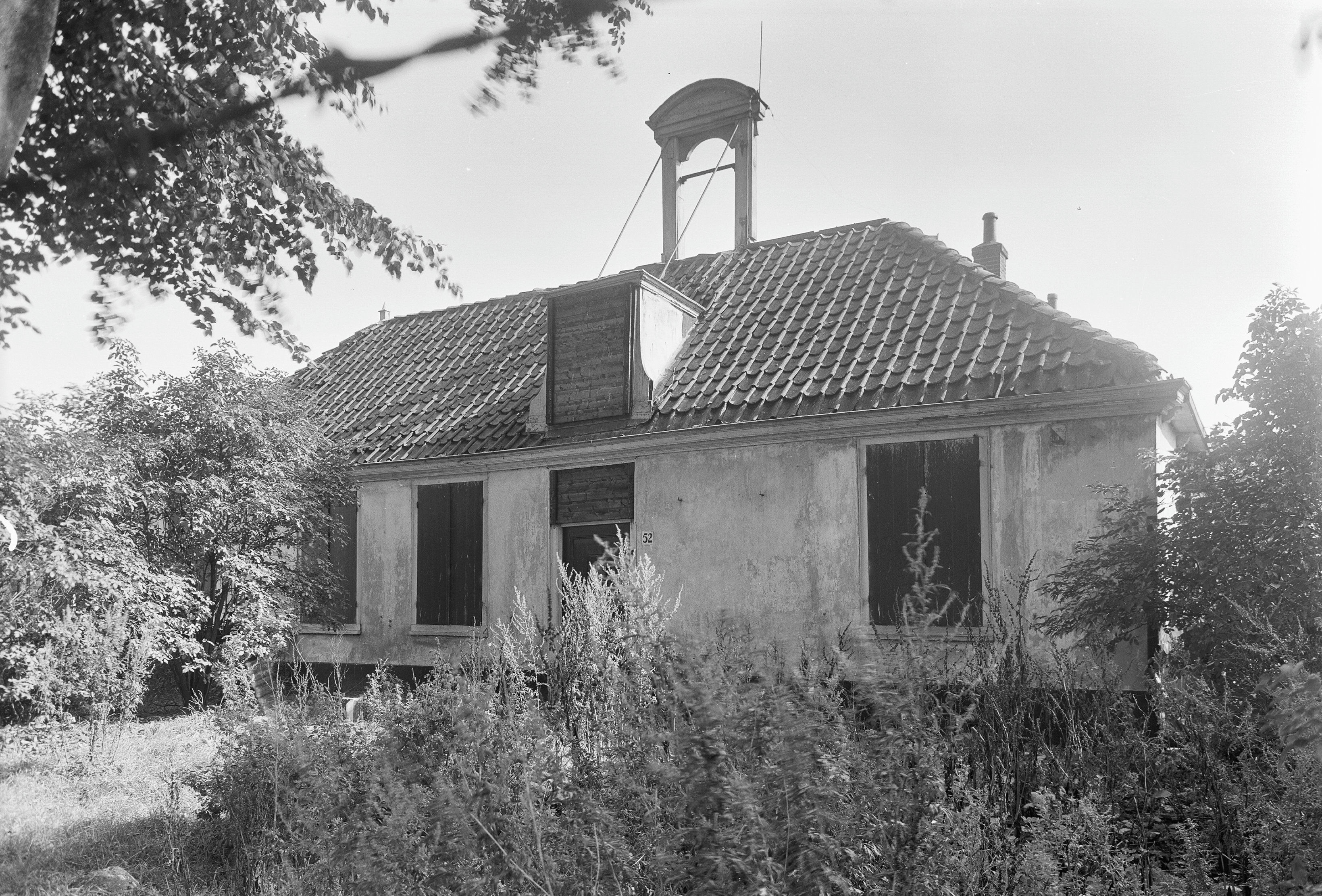 Oude Rechtsgebouw: Vergierderweg 52, gevel